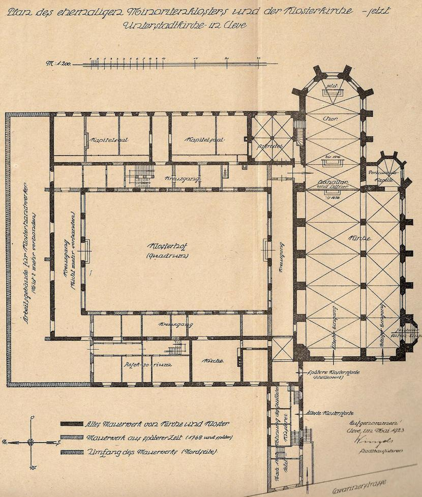 Kleve, Minoritenkloster, Rekonstruktionszeichnung des Grundrisses